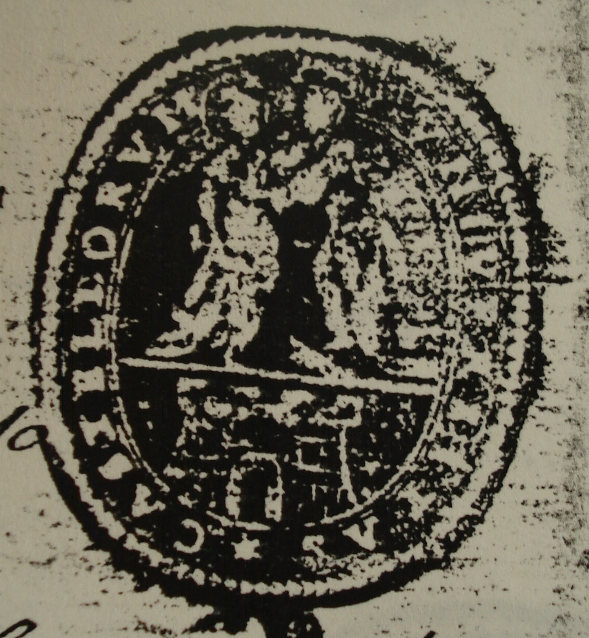 Sigillo con dicitura " CASTELLORUM UNIVERSITAS "